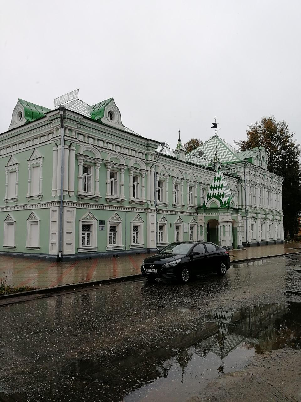 Здание городской управы: площадь Ленина, 2, Шуя, Ивановская область